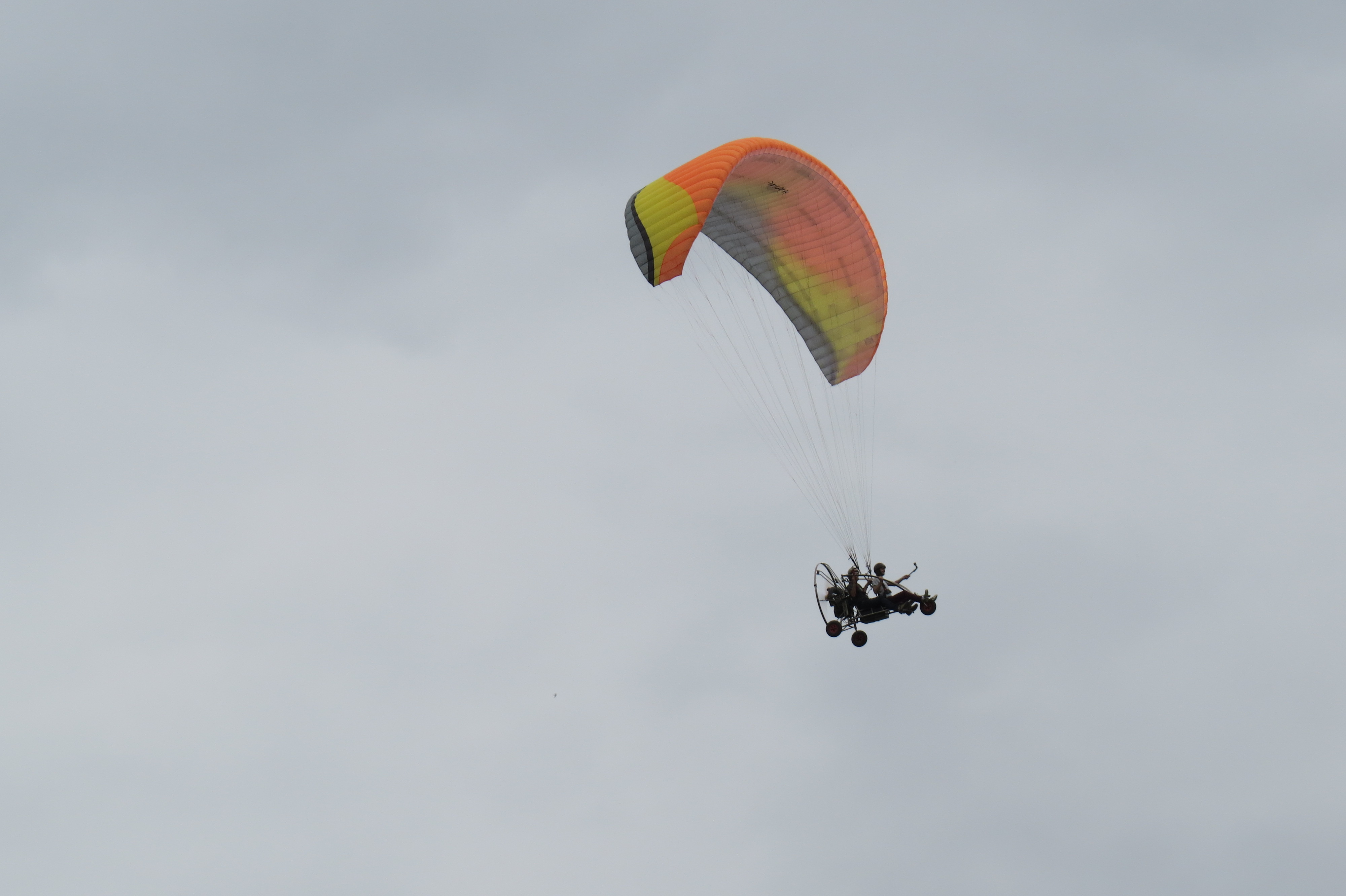 Թռիչք պարապլանով